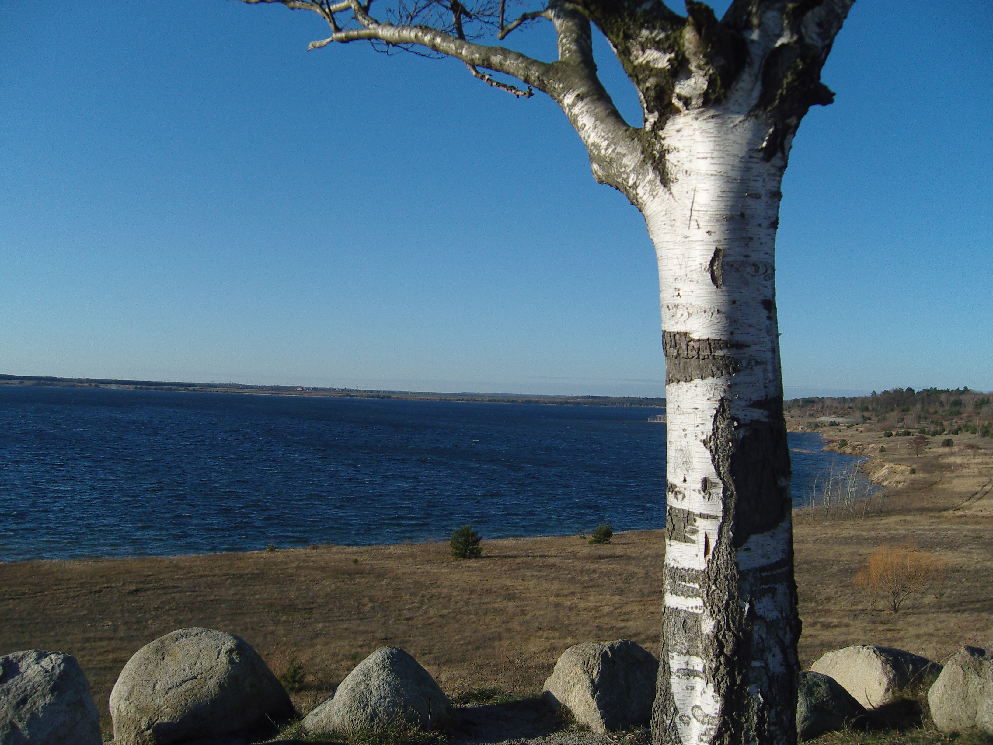 Sedlitzer See vom Aussichtspunkt in Lieske, Niederlausitz